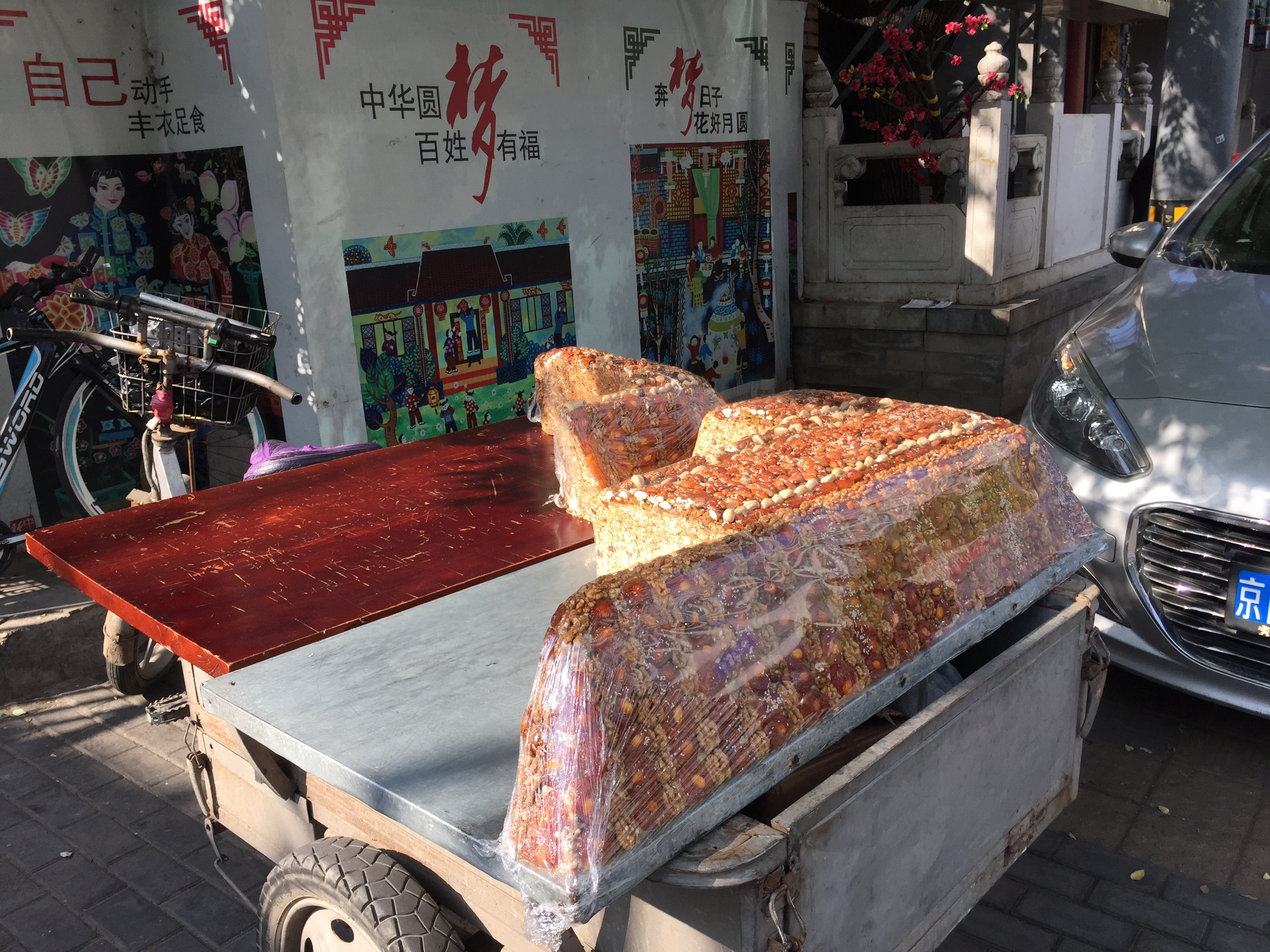 三轮车上的玛仁糖（切糕状）